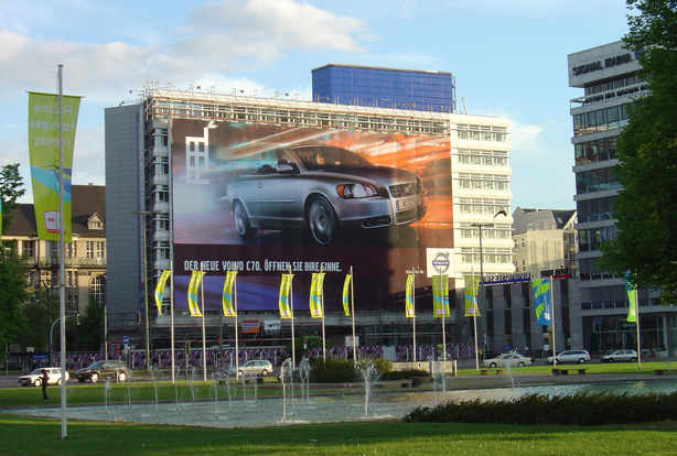 The Ernst-Reuter-Platz, Berlin, Germany